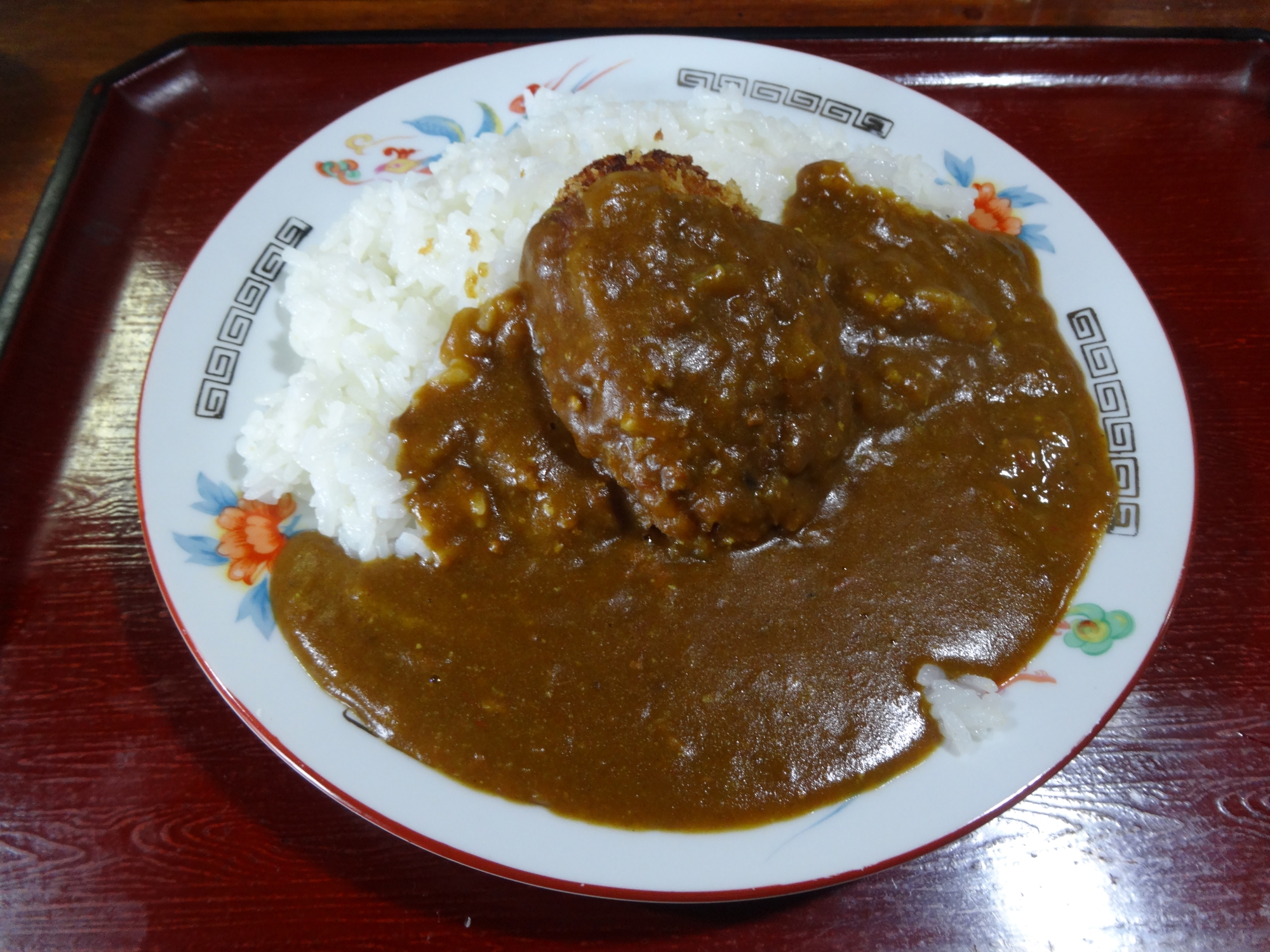 いちきポンカレー（鹿児島県いちき串木野市、御食事処ぎおんにて撮影）